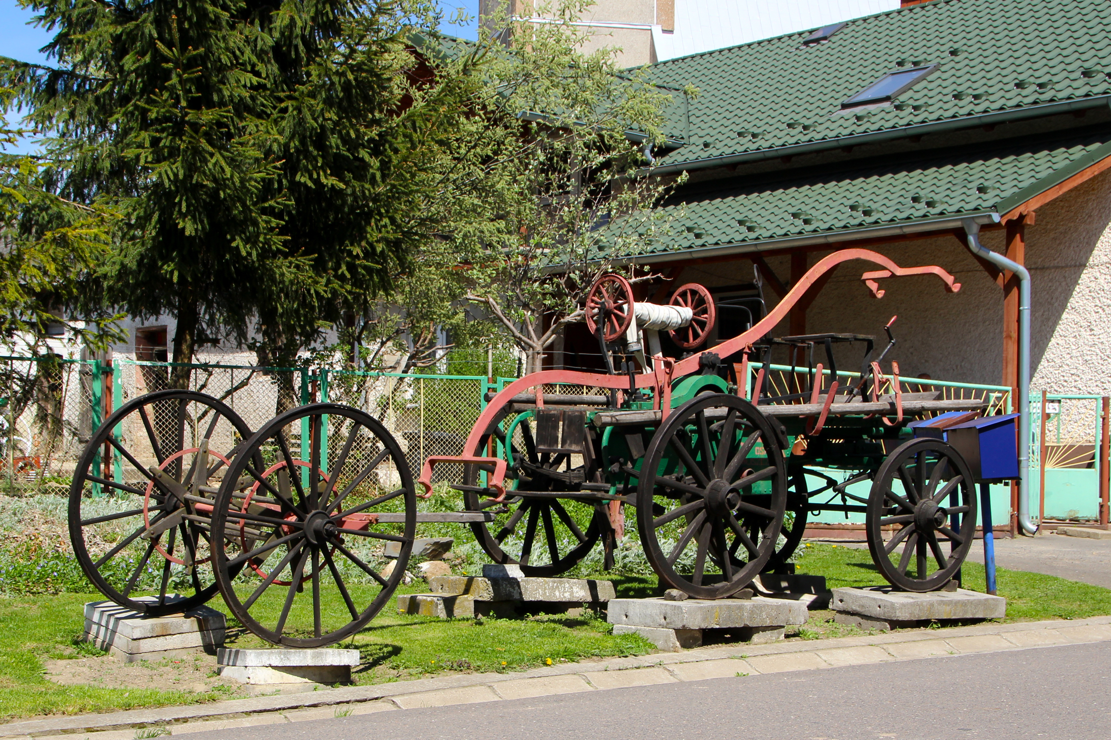 Bliszczyce – wieś w Polsce położona w województwie opolskim, w powiecie głubczyckim, w gminie Branice.